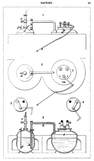 Imagem publicada por Thomas Savery em seu livro The Miner's Friend: Or, an Engine to Raise Water by Fire, que descreve a criação de uma máquina a vapor (motor) capaz de bombear água para fora das minas de carvão.